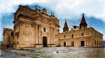 San Francisco en 1875. Pintura sobre una fotografía original de Eadweard Muybridge.